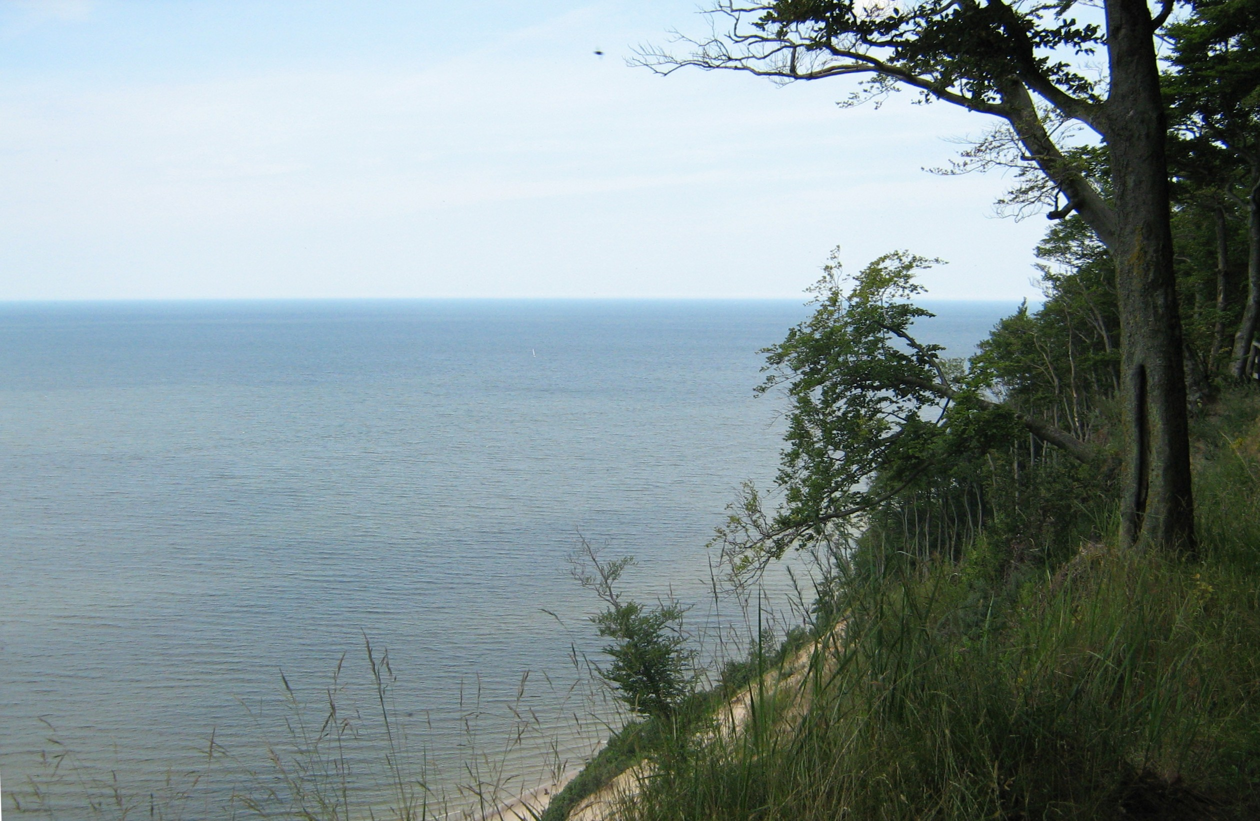 Woliński Park Narodowy, klif, widok ze wzgórza Gosań.